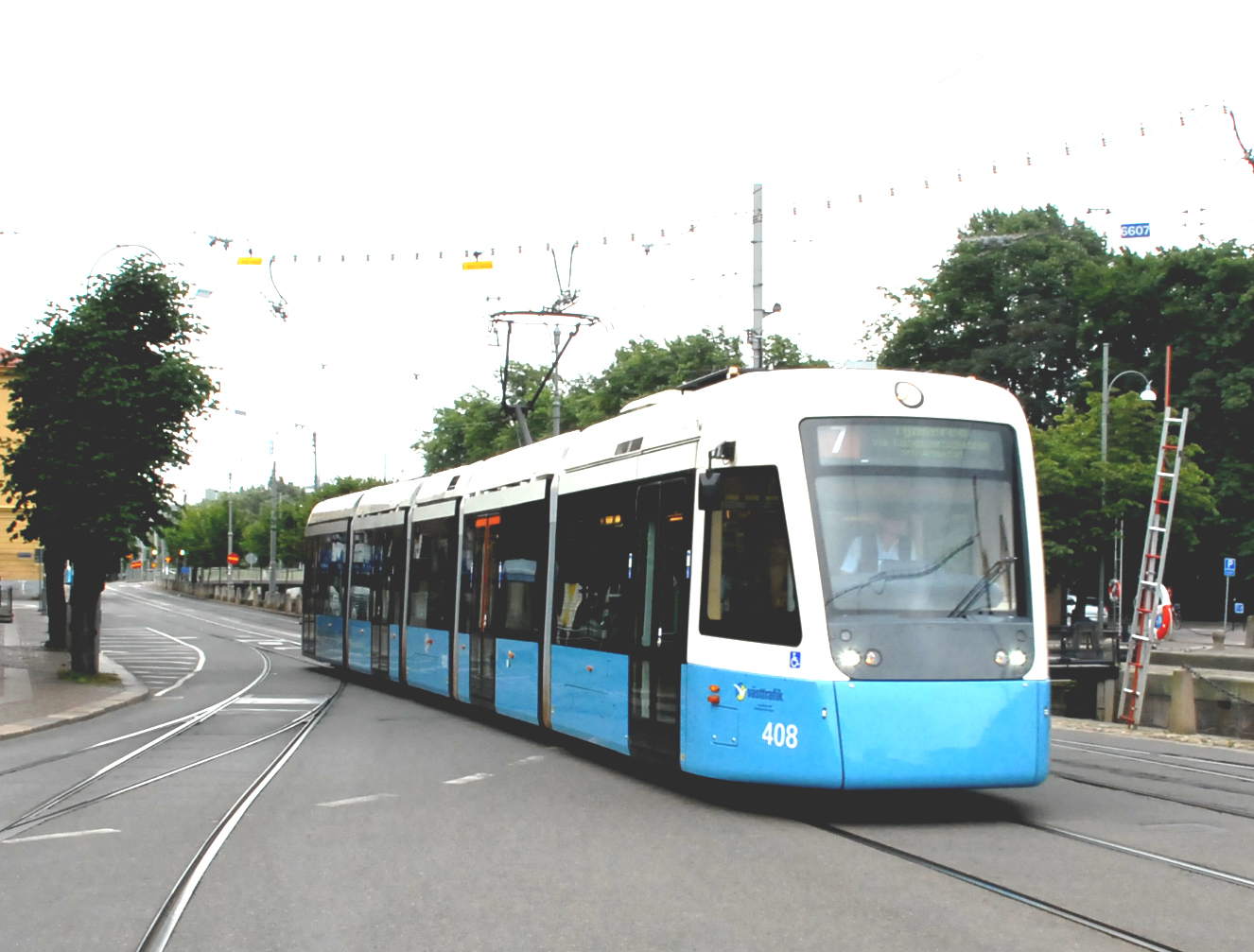 Göteborgs Spårvägar AB tram 408 van het type M32 op 26 juli 2007 aan de Stampgatan te Göteborg.